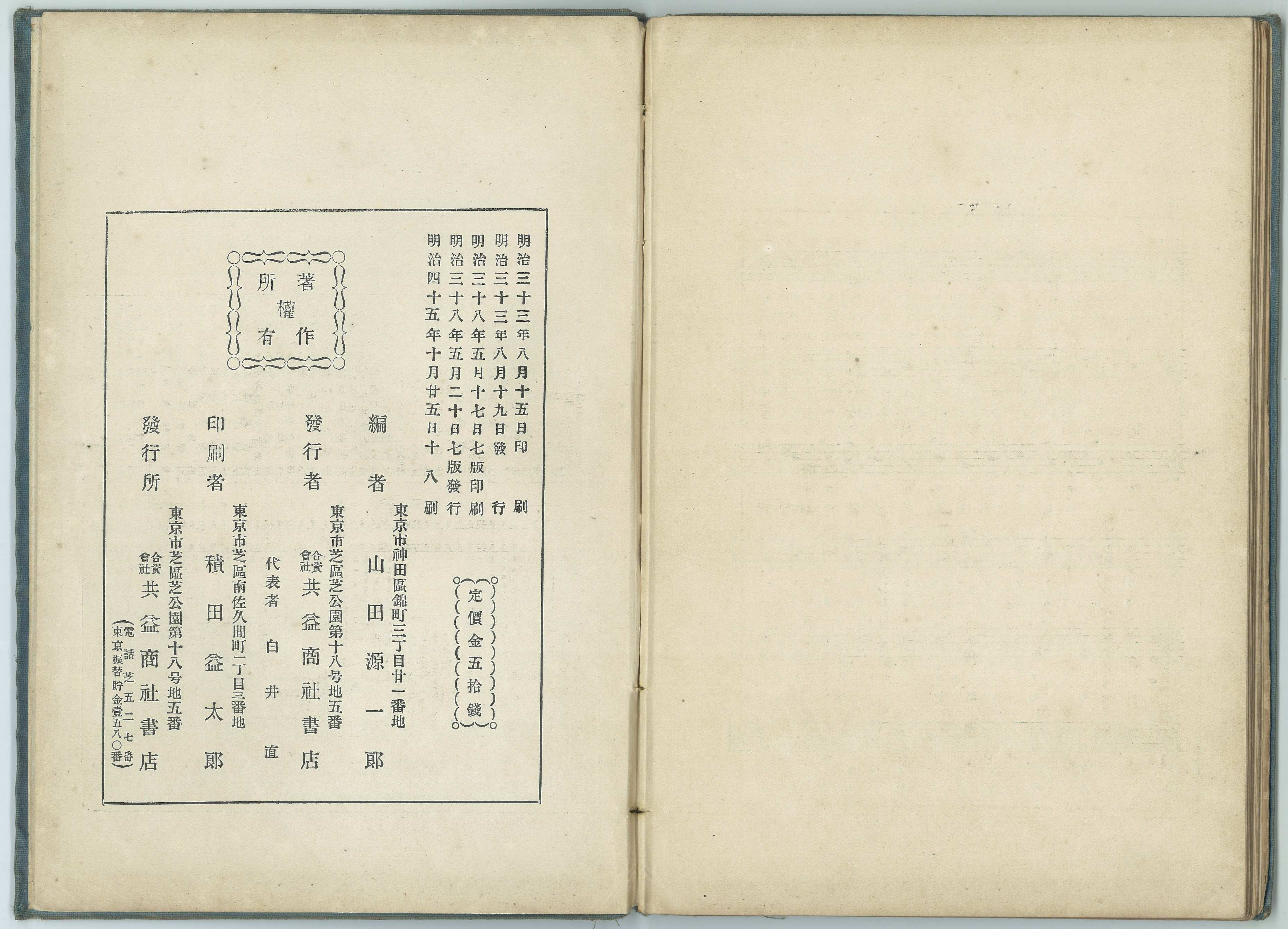 表紙 山田源一郎編 『女學唱歌（第壹集）』[『女学唱歌 第壱集』] 明治三十三年八月十五日印刷 明治三十三年八月十九日發行 [発行] 明治三十八年五月十七日七版印刷 明治三十八年五月二十日七版發行 明治四十五年十月二十五日十八刷 定價金五拾錢 [定価金五拾銭] 著作権所有 編者 東京市神田区錦町三丁目廿一番地 山田源一郎 發行者 東京市芝区芝公園第十八号地五番 合資會社 共益商社書店 印刷者 東京市芝区南佐久間町一丁目三番地 積田益太郎 發行者 東京市芝区芝公園第十八号地五番 合資會社 共益商社書店 （電話芝五二七番 東京振替貯金壹五八〇番）